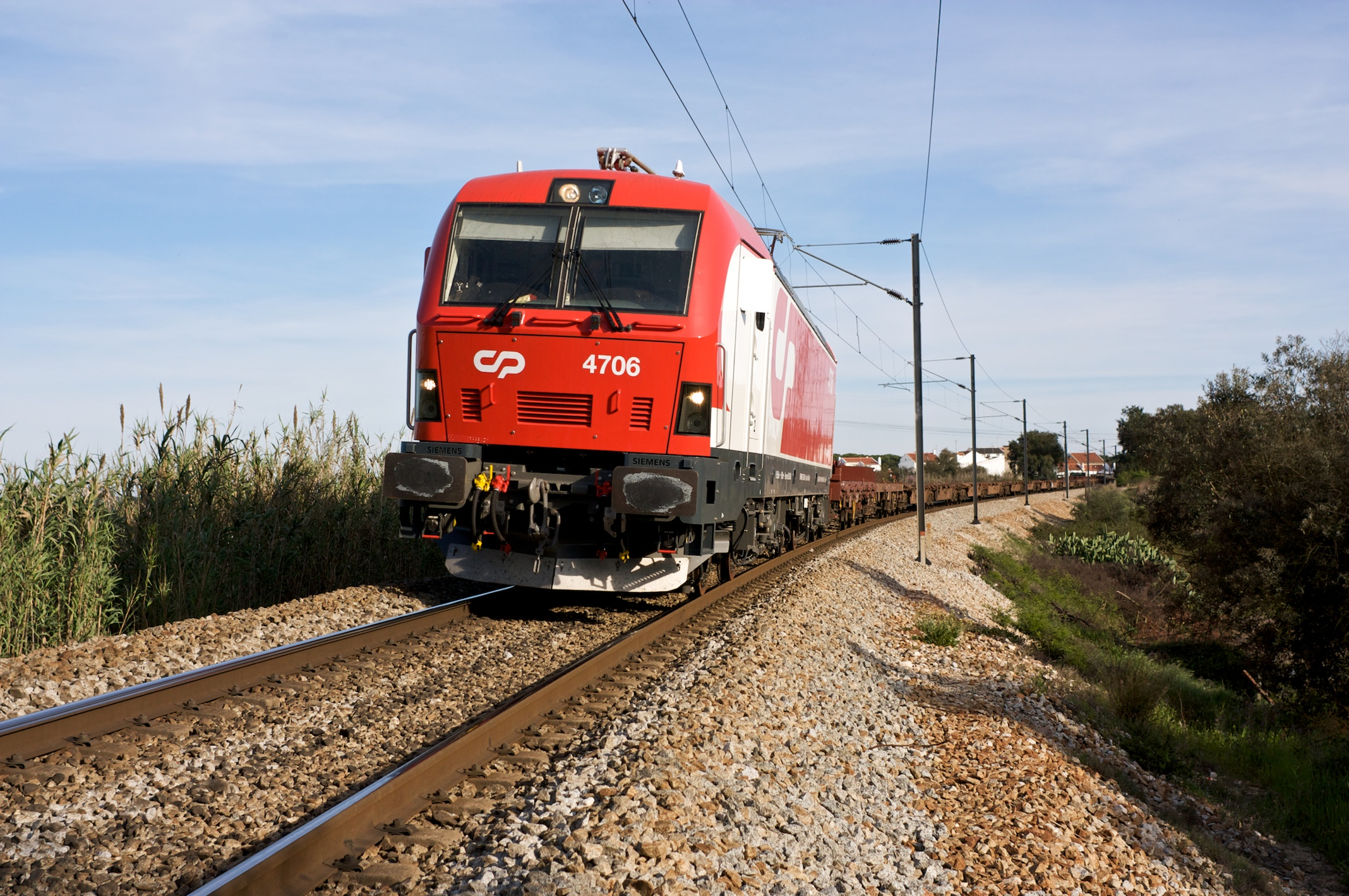 Tipo: Comboio de Transporte de Contentores (material vazio) 81830/1 [Sines - Bobadela] Local: Alcácer do Sal [Linha do Sul, PK 80] Data e hora: 11 de Março de 2009 [16h41] Material: Locomotiva 4706 + xx vagões CP Sggmrss e outros